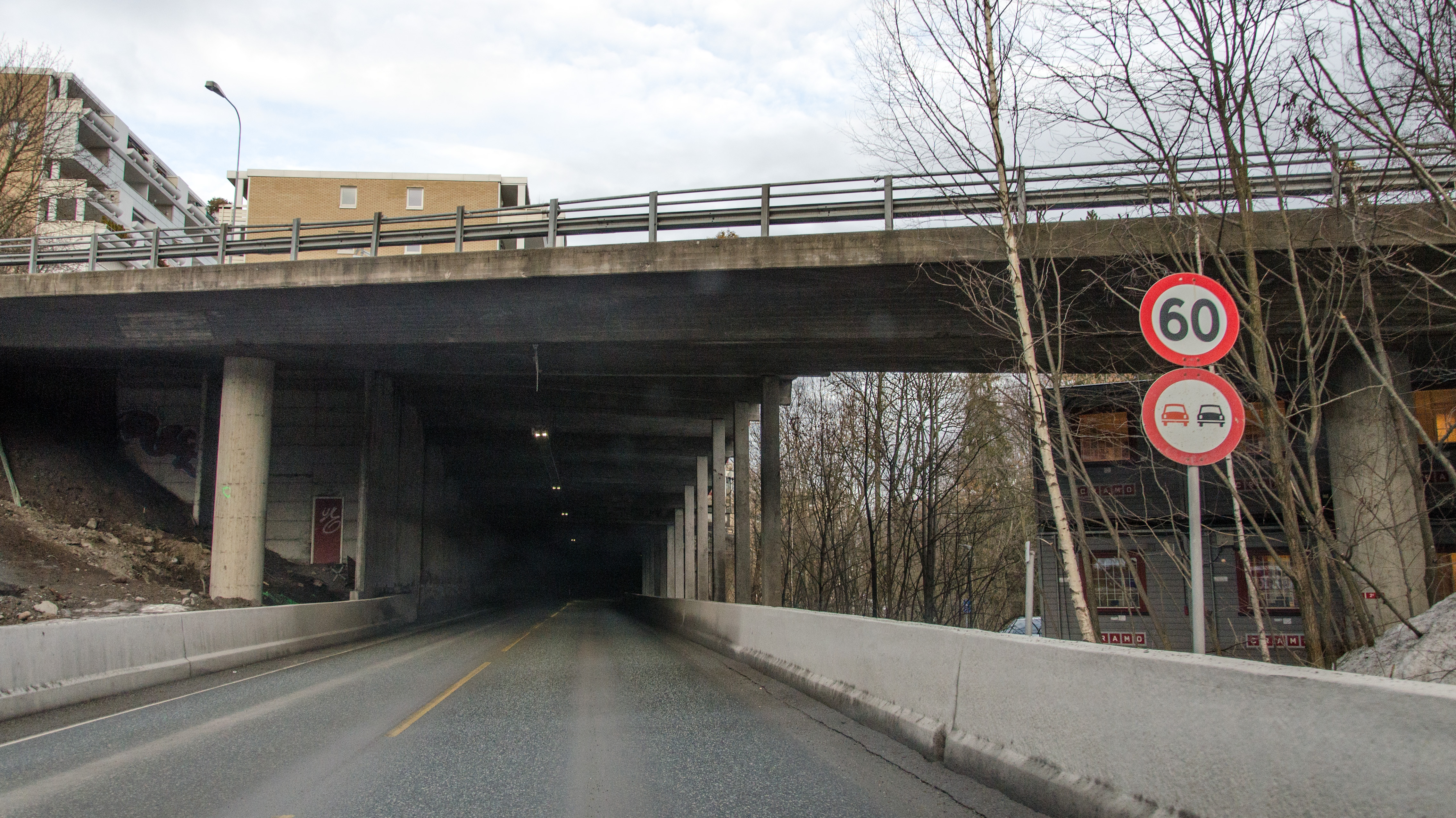 Evjetunnelen